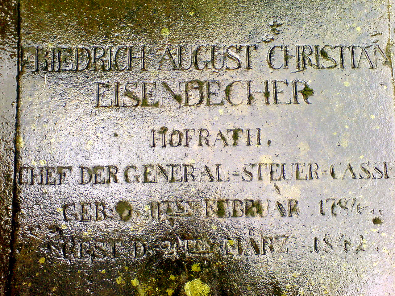 Foto im nassen Zustand: Inschrift der Grabplatte von Friedrich August Christian Eisendecher auf dem Neustädter Friedhof in Hannover ...